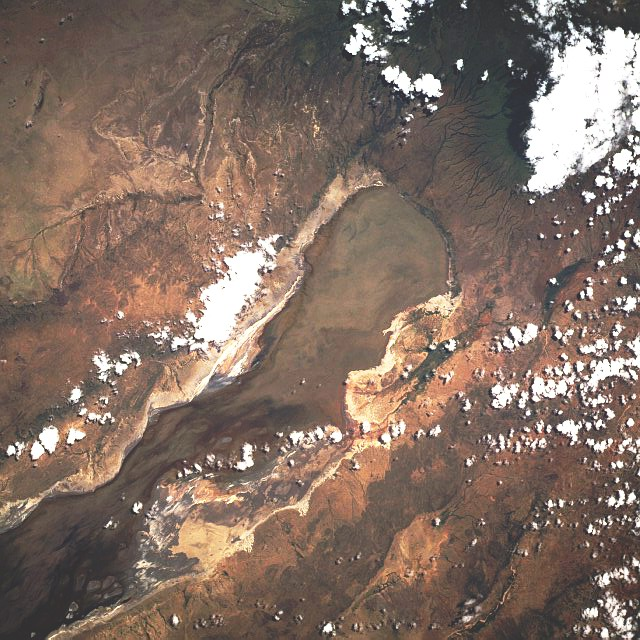 Lake Eyasi, Tanzania - May 1993